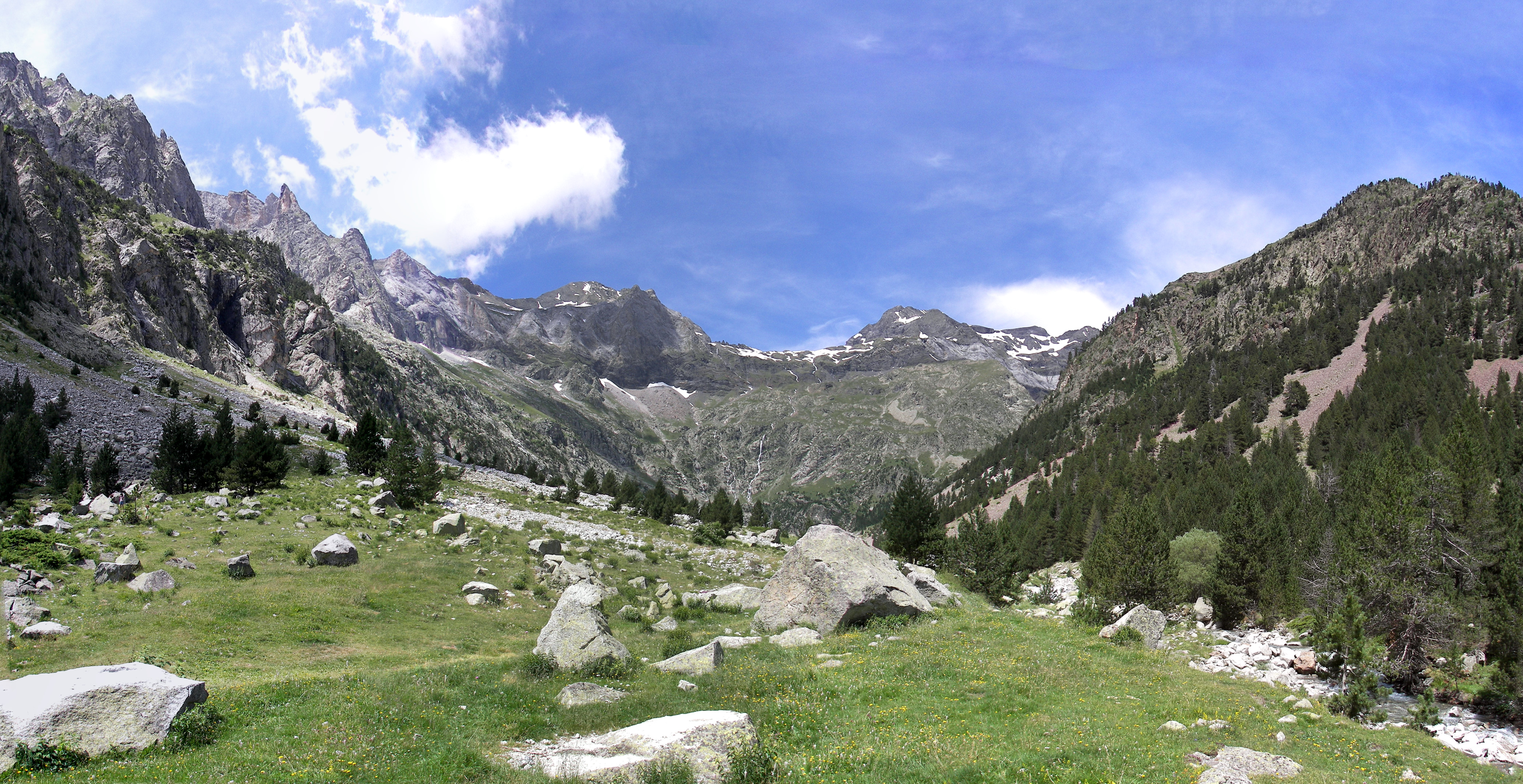 Alto Valle del Cinca This is a photography of a Special Area of Conservation in Spain with the ID: ES2410052. Natura2000 entry, EEA entry